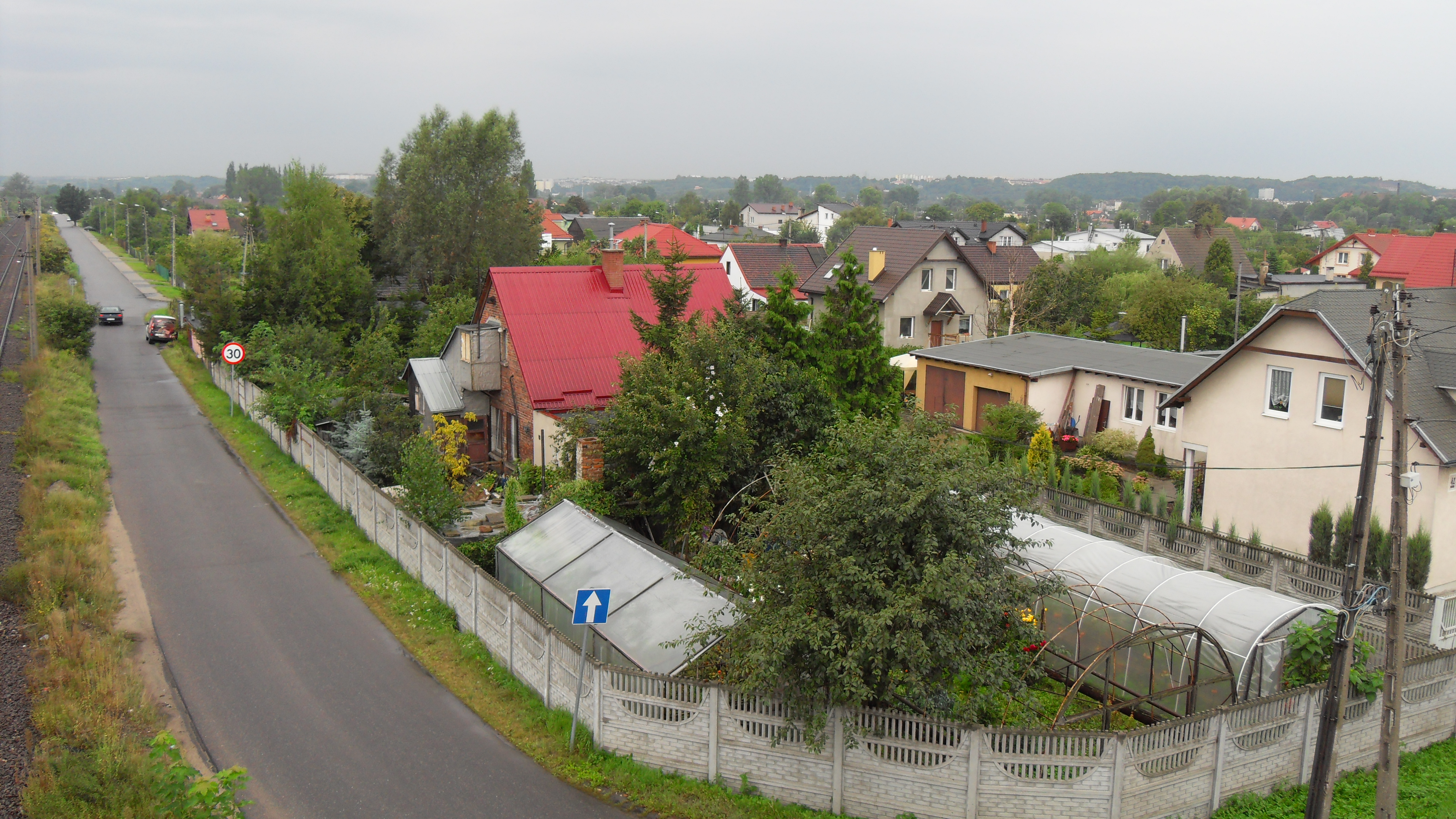 Gdańsk Olszynka Wielka.